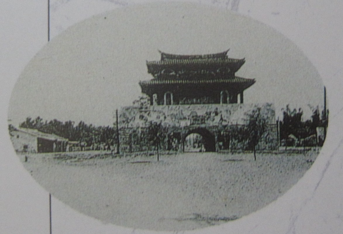 1931年的臺灣府城大東門